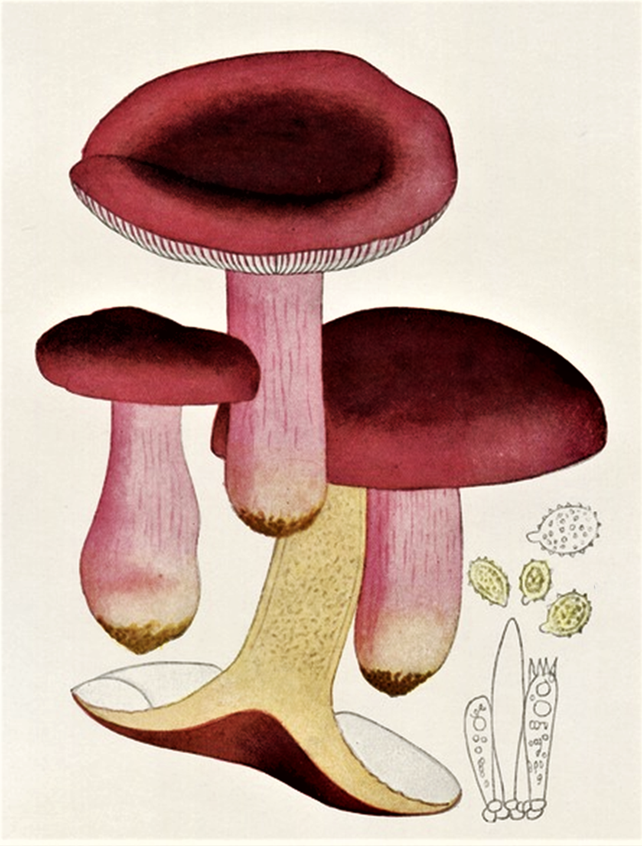 Giacomo Bresadola: Russula xerampelina (Schaeff., 1774) Fr., 1838)